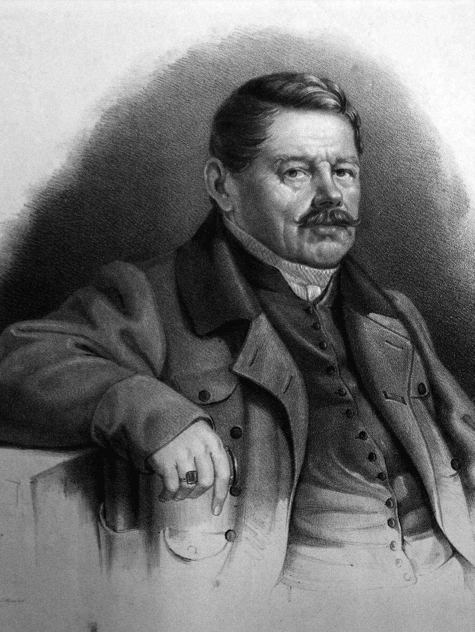 Hohenlohe-Waldenburg, Karl Albrecht III., Fürst zu (1776-1843), lithographiert von B. Weiss, gezeichnet von G. Küstlin (unleserlich). Breite 24,6 x Höhe 31,6 cm.